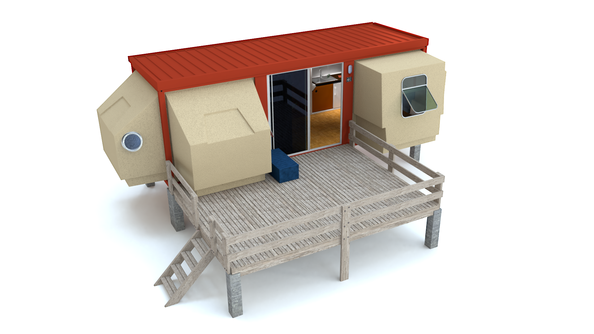 Vue en trois dimensions d'un habitat type "Tétrodon"